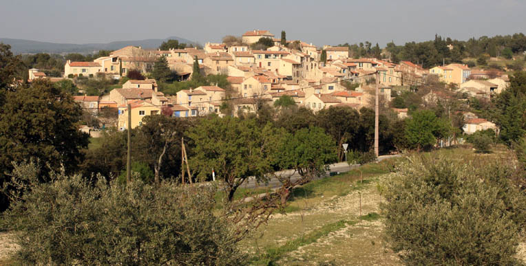 Village of La Bastidonne in Vaucluse, France